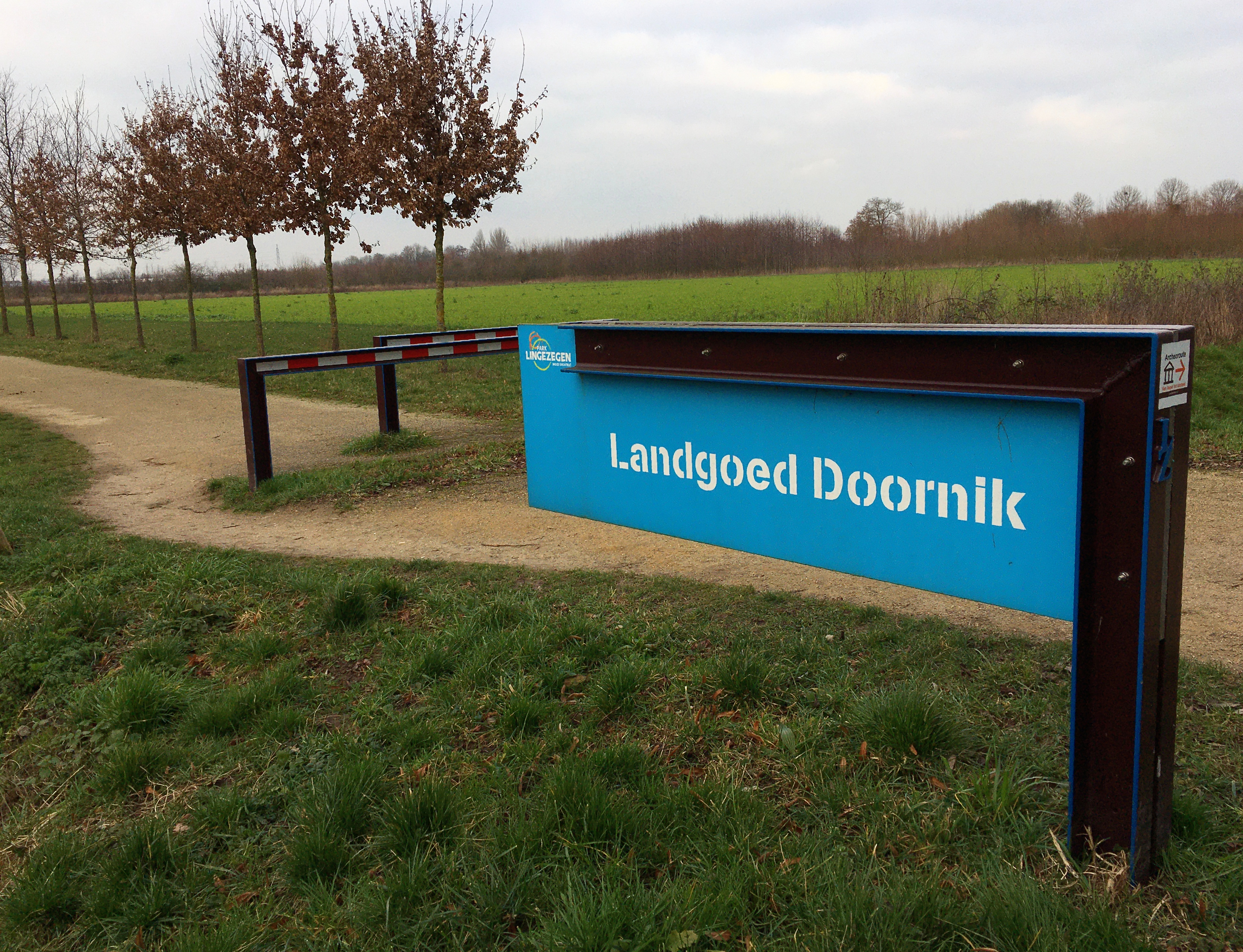 The estate of Doornik in Bemmell (Lingewaard)